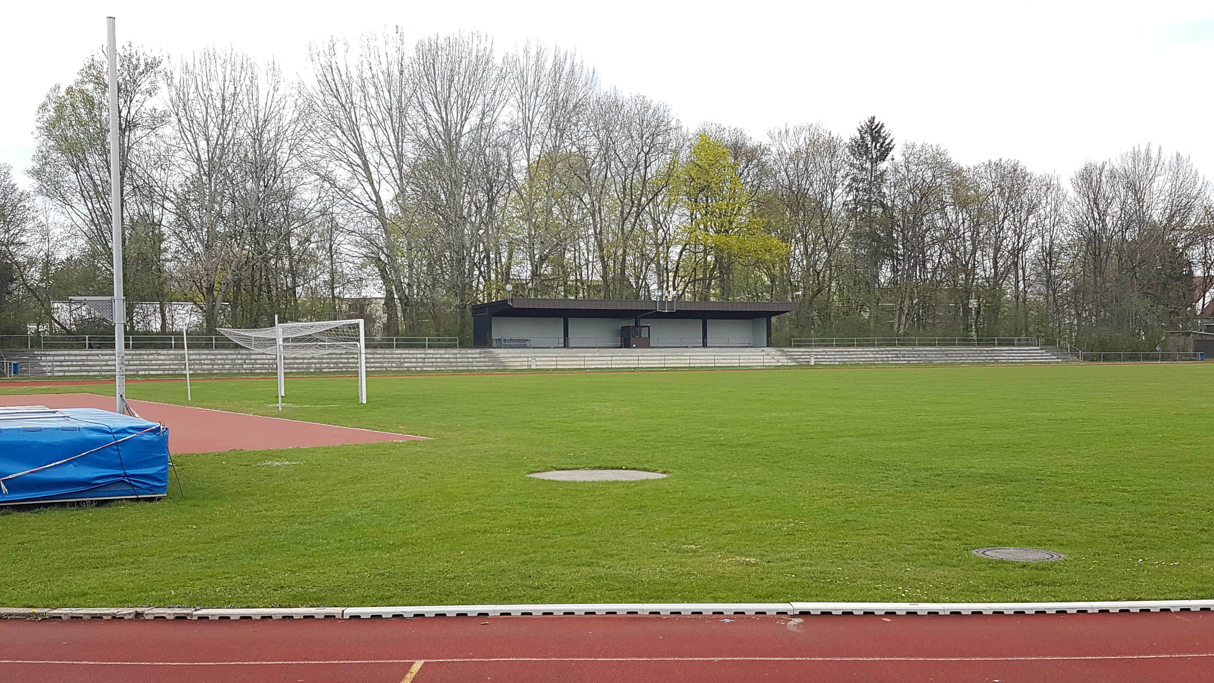 Unterhaching, Stadion Grünau, alte Spielstätte der SpVgg Unterhaching